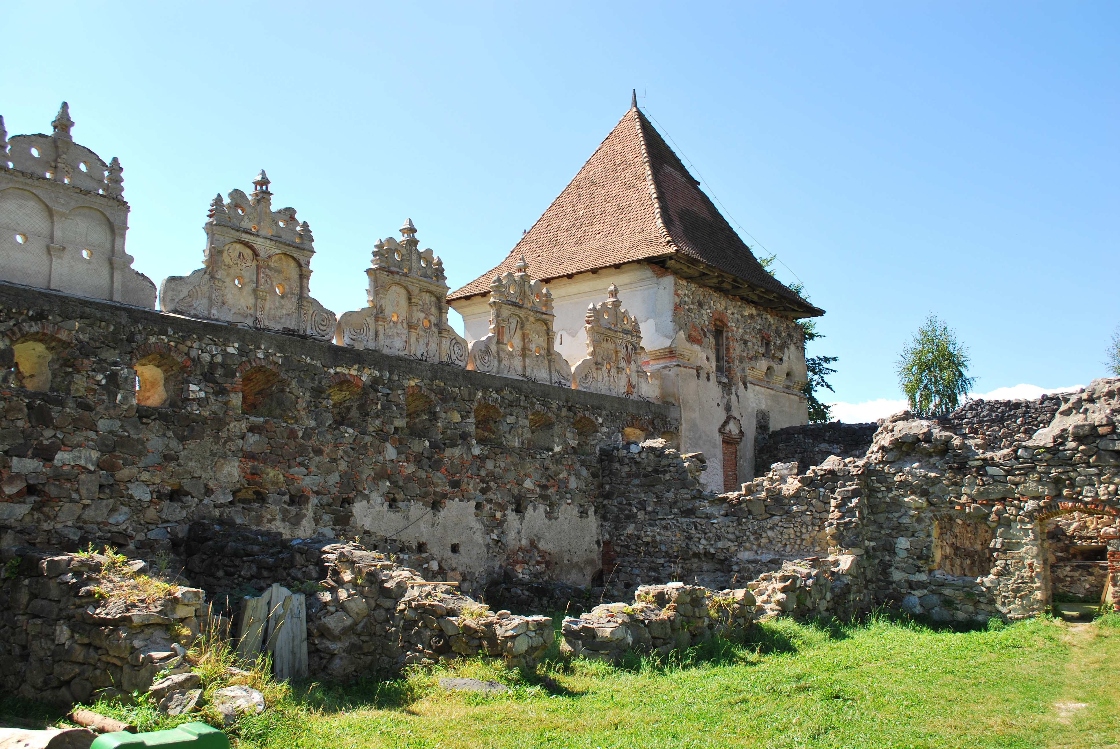 Bastion Sud Estic 05